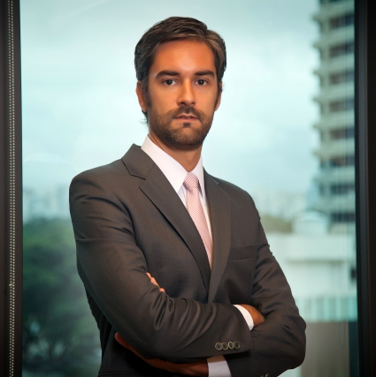 Augusto de Arruda Botelho, presidente do Instituto de Defesa do Direito de Defesa - IDDD